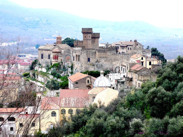 Wikipedia: Taurano